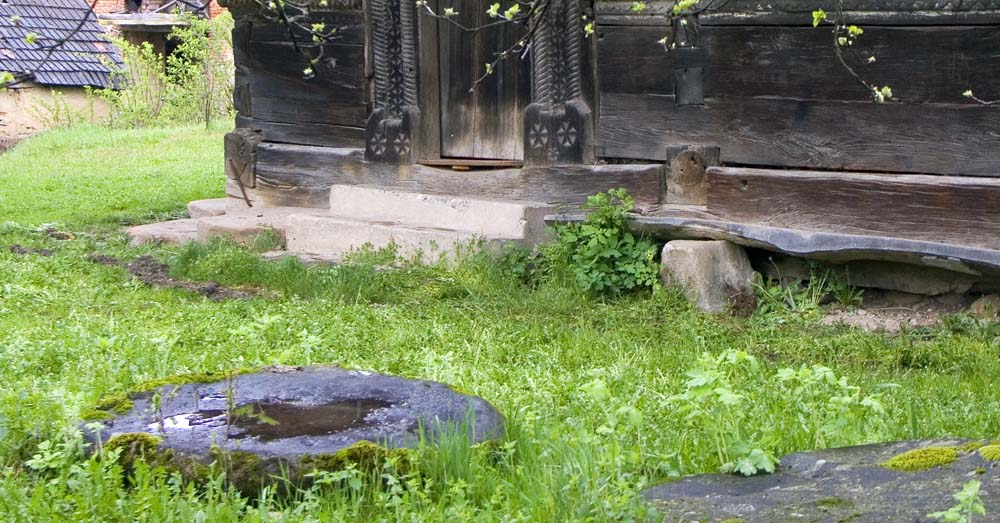 Biserica de lemn din Bălan Josani, pietrele din faţa bisericii.